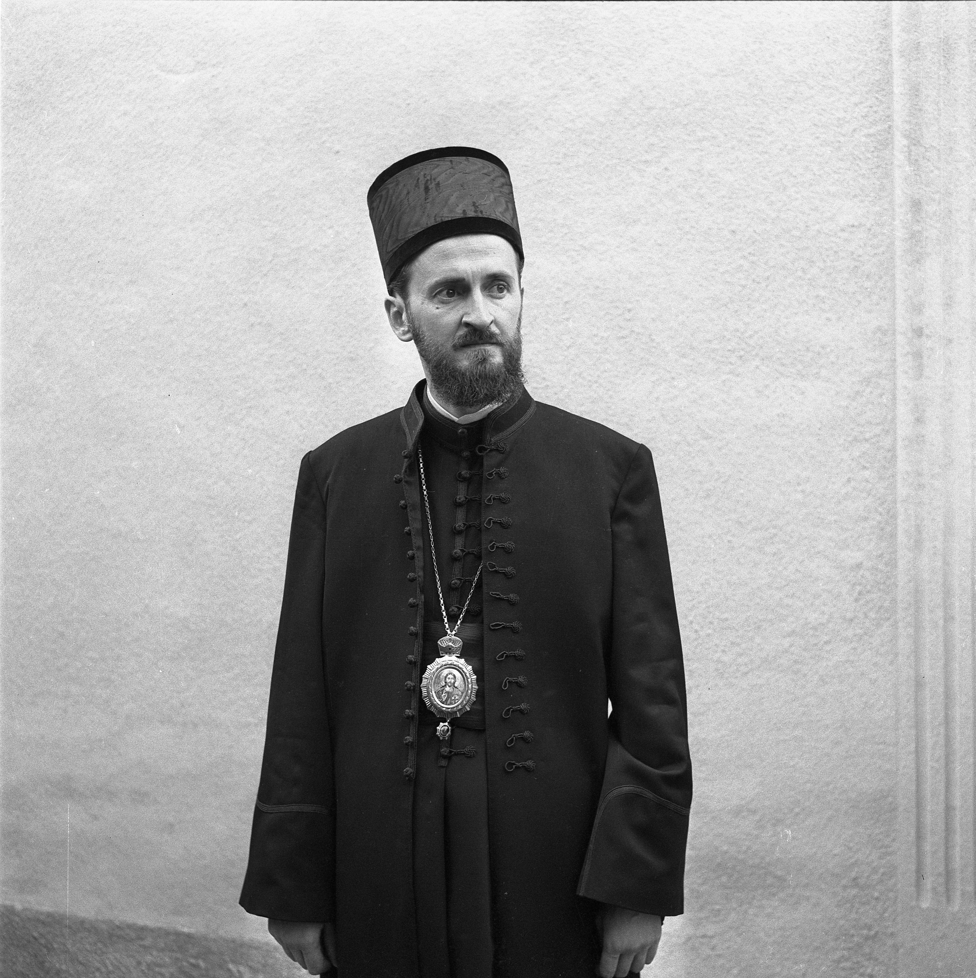 Stevan Kragujevic, Vladika Sava u mladosti